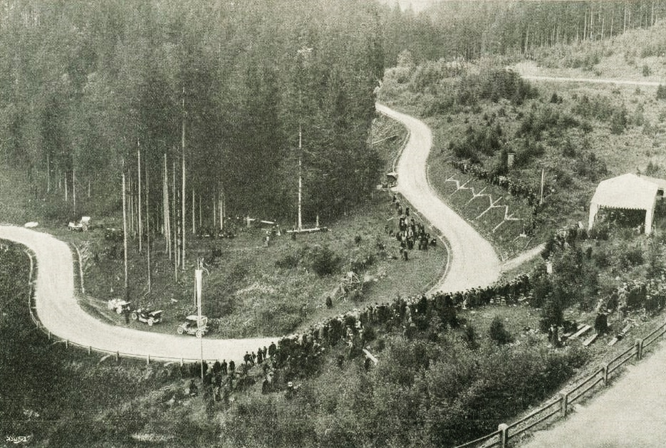 La première course de côte du Kesselberg en 1905 - La Vie au Grand Air du 25 août 1905, p.708